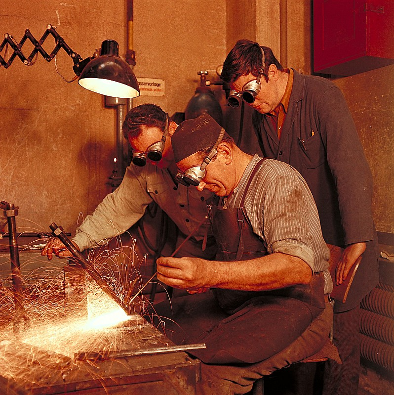 Original image description from the Deutsche Fotothek Schweißerschutzglas